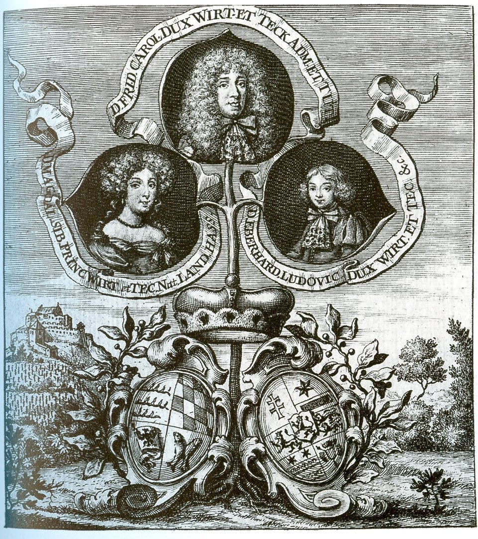 Eberhard Ludwig von Württemberg mit seiner Mutter Magdalene Sibylle von Hessen Darmstadt und der Administrator des Herzogtums Friedrich Karl von Württemberg (Winnental)